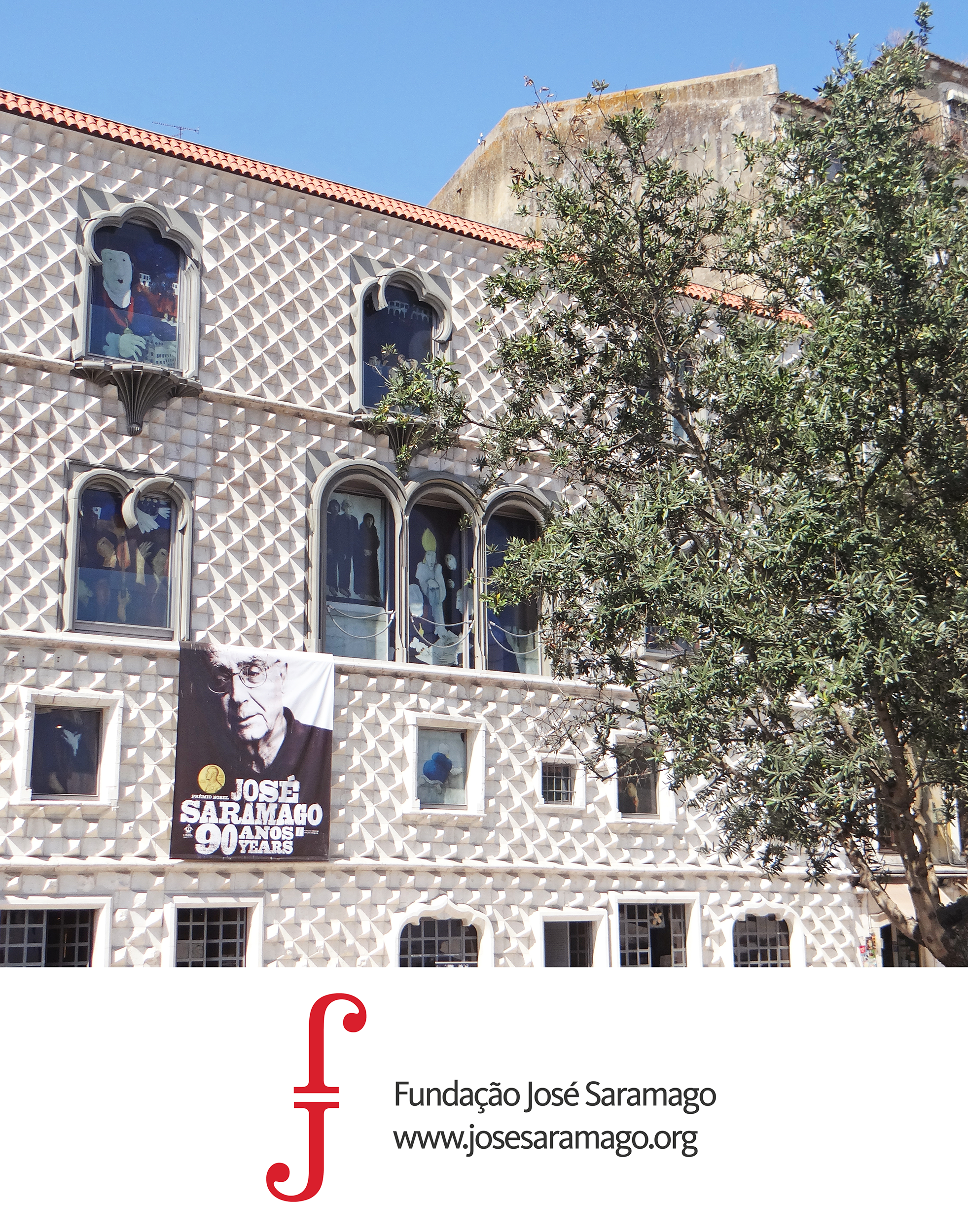 Fundação José Saramago na Casa dos Bicos, e logo da instituição